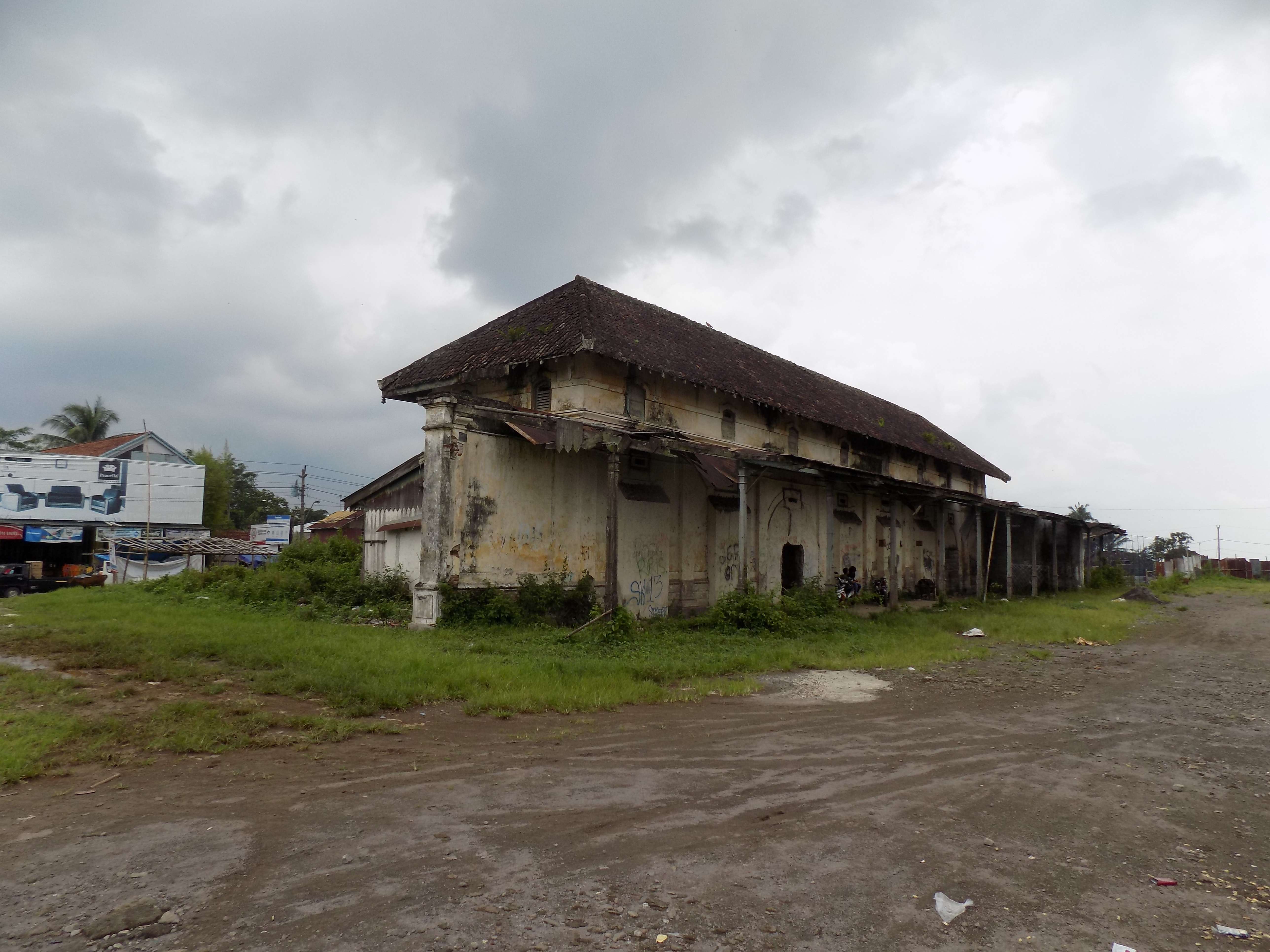 Stasiun Bringin, tampak peron